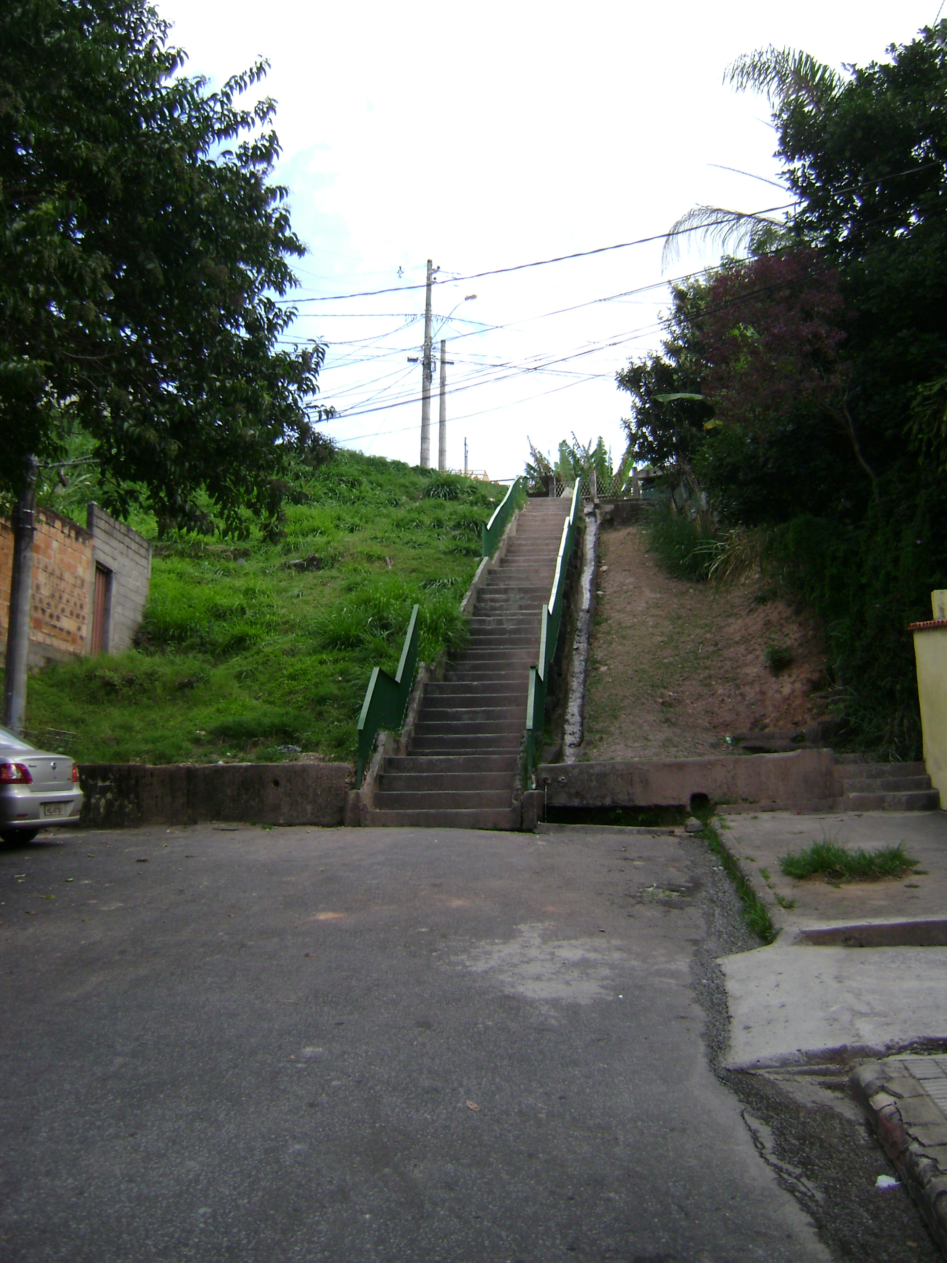 Escada que liga a rua Viçosa ao morro do Papagaio, no bairro São Pedro, em Belo Horizonte, Brasil.